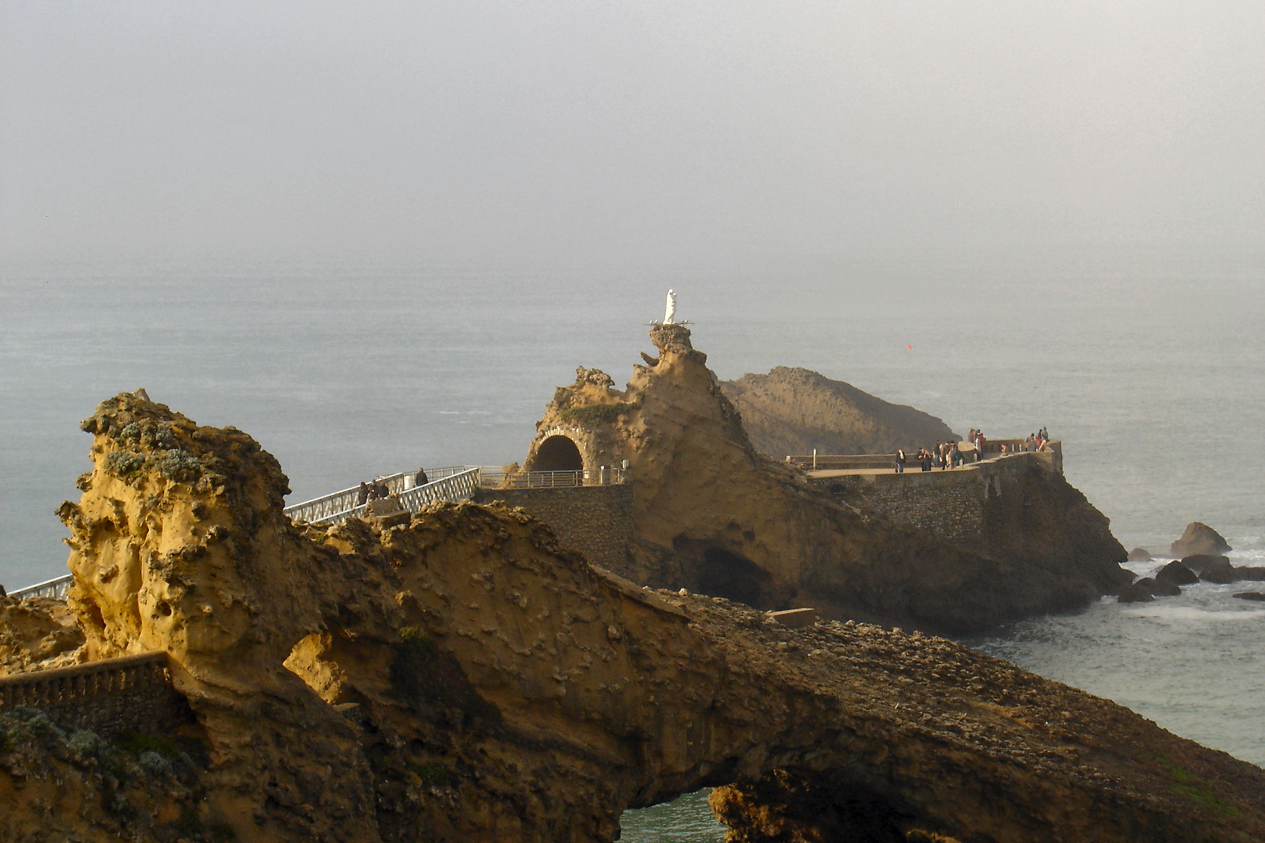 Le rocher de la Vierge (Biarritz)